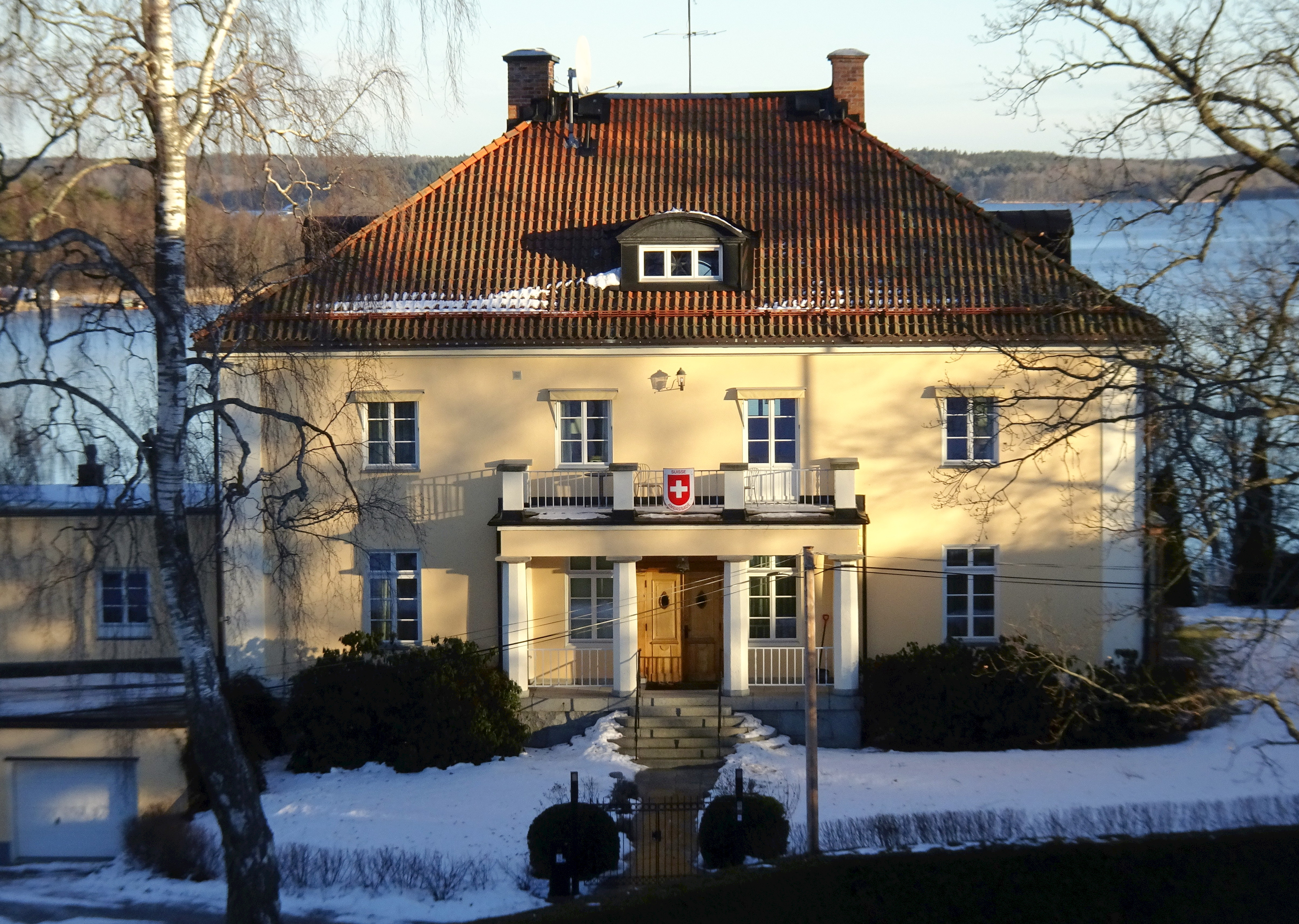 Skärsnäsvägen 18, Djursholm. Schweiz ambassad i Stockholm, ambassadörens residens i Djursholm.